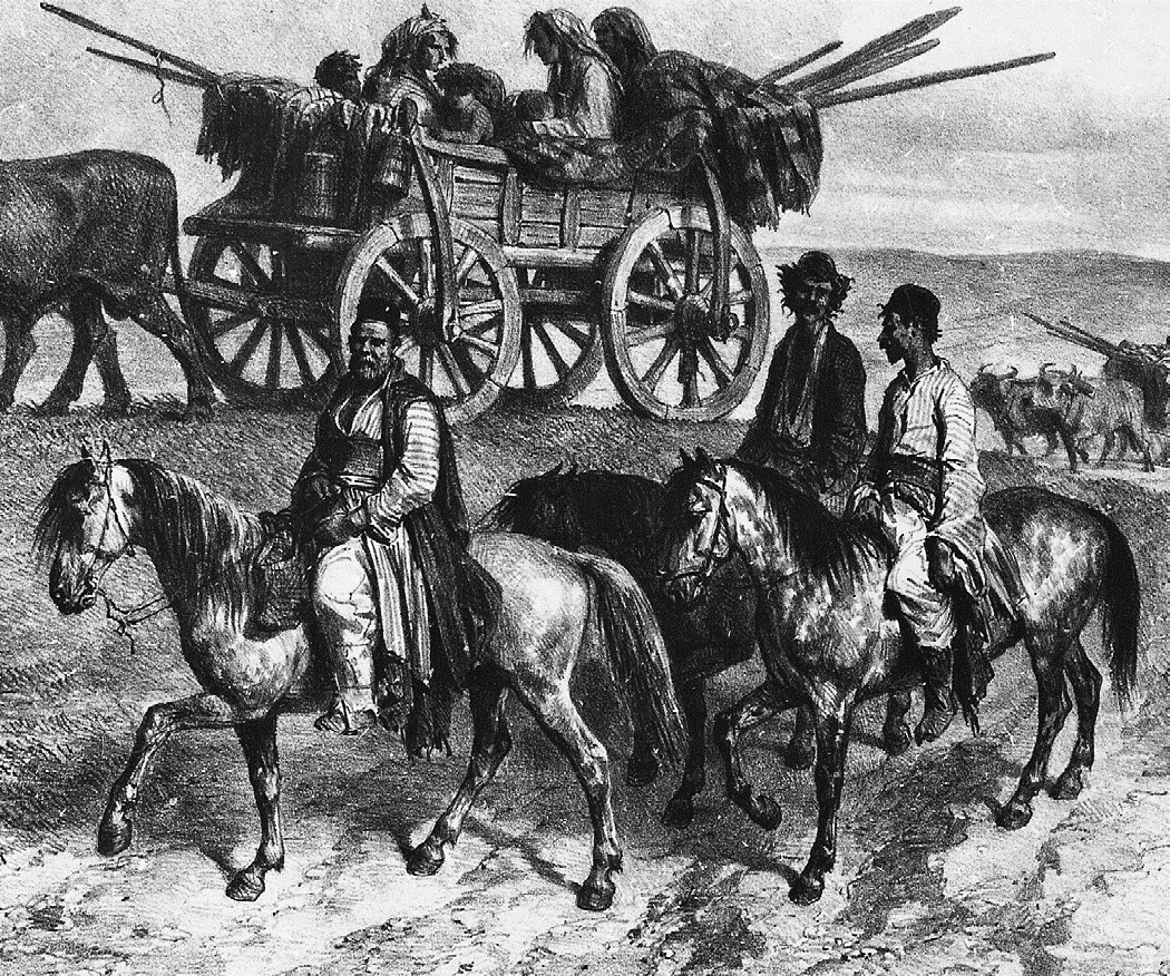 Auguste Raffet, Famille tsigane en voyage en Moldavie, 1837 Gypsy family on tour in Moldavia Un rustique chariot dans lequel sont entassés au milieu d agrès et de toiles de campement des femmes échevelées et des enfants à demi-nus s'avance lentement traîné par deux buffles à travers une plaine immense à droite un Tsigane l'aiguillon à la main marche auprès d'un second chariot. Le chef de cette famille de bohémiens à cheval ainsi que les deux serviteurs qui le suivent chemine au premier plan. 1839